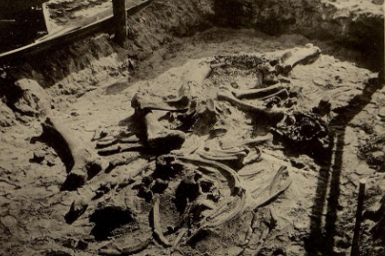 Расположение костей ярославского мамонта при раскопках.